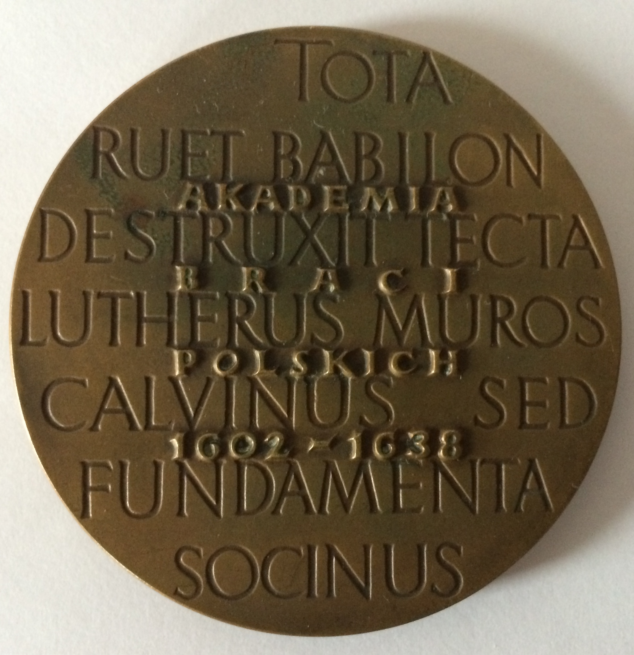 Medal upamietniajacy Akademie Braci Polskich 1602-1638 wybity w 1969